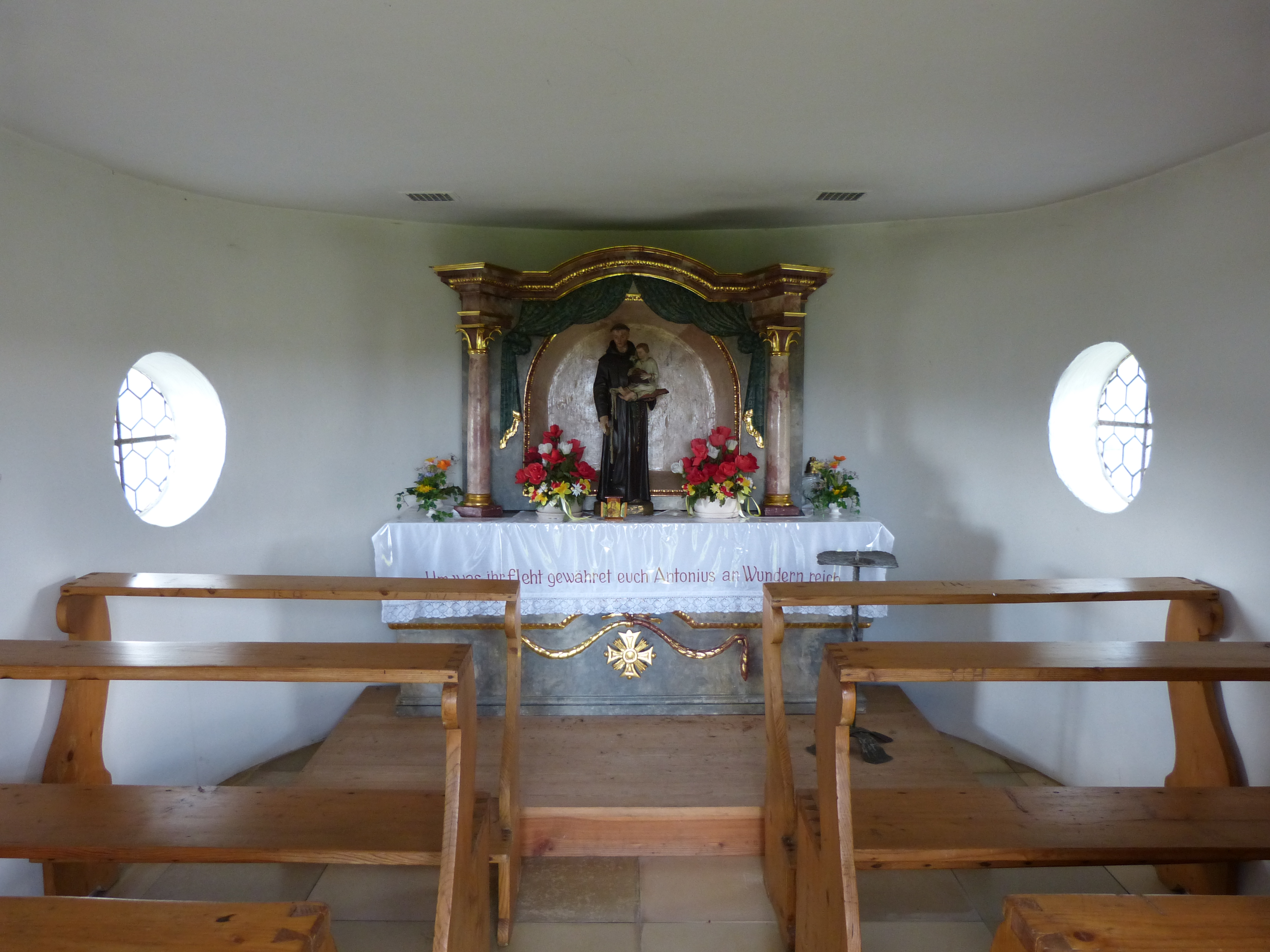 St. Antonius im Ortsteil Haselbach, Eppishausen, Landkreis Unterallgäu, Bayern